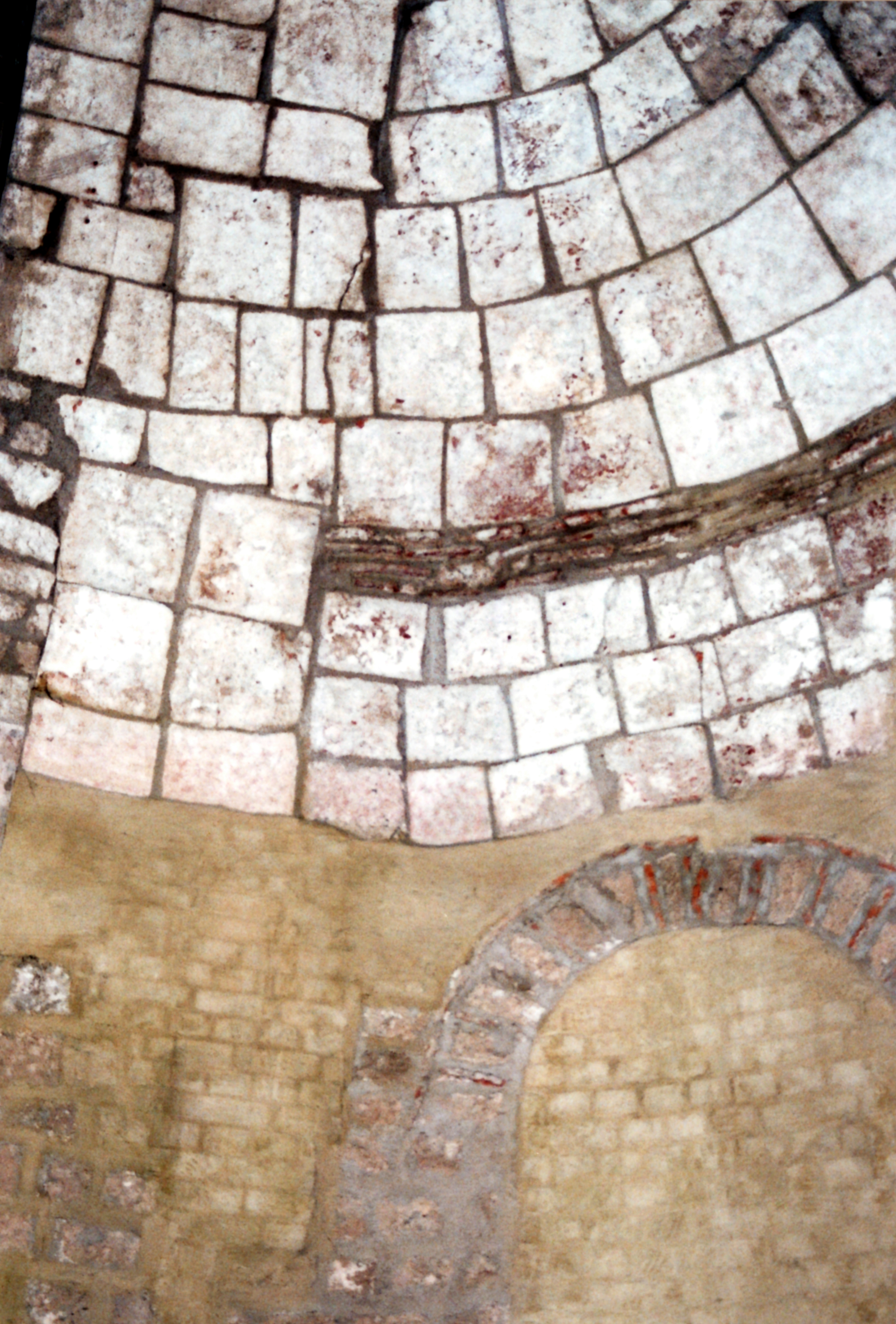 Köln, St. Gereon: Südliche Apsis des spätantiken Zentralbaus.